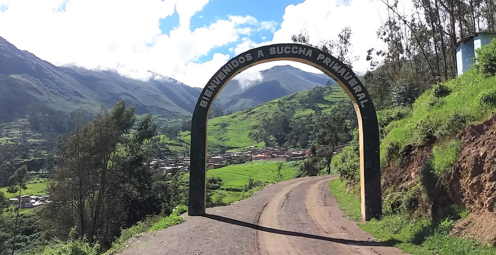 Vista del arco de bienvenida a los viajeros que llegan a visitar al pueblo desde el oeste, ya sea desde Huarmey vía Huayán, o desde Huaraz vía Coris.